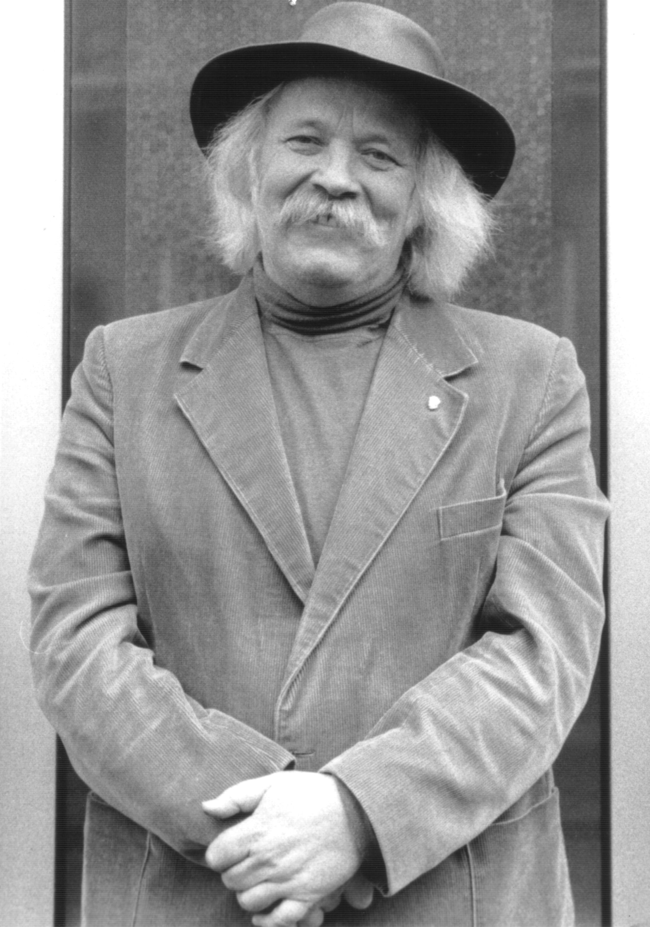 Peter Blanker (Rotterdam-Delfshaven, 11 juni 1939) is een Nederlands dichter en artiest